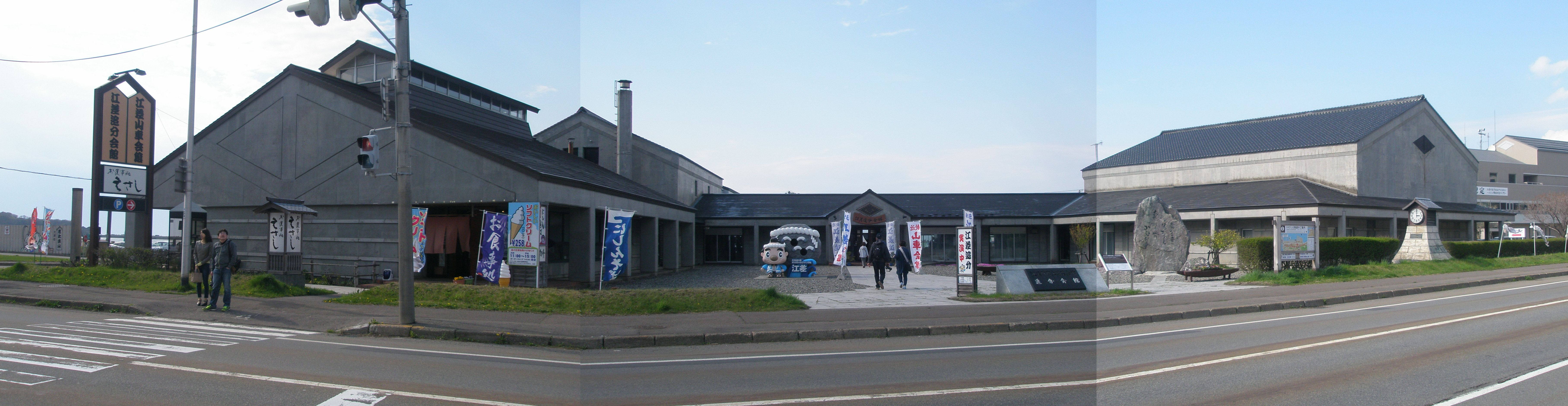 江差追分会館・全景（3枚合成）